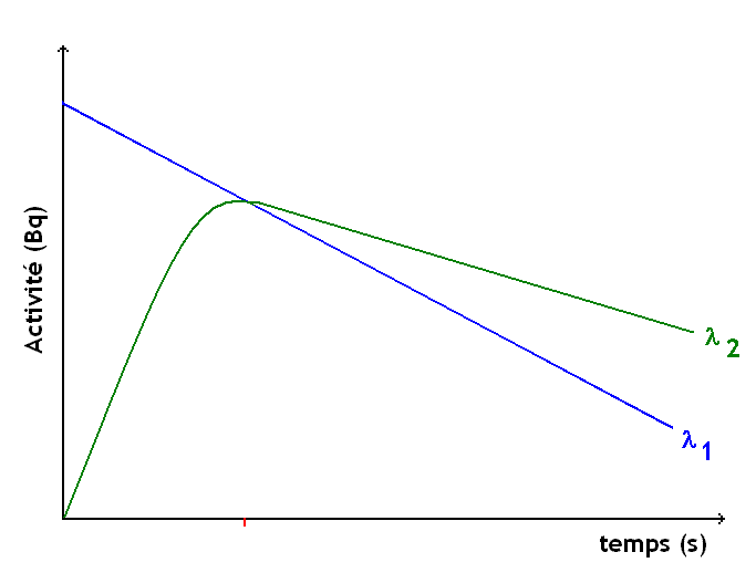 Courbes de décroissance radioactive de deux isotopes en filiation